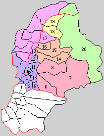 長野県下高井郡の町村。